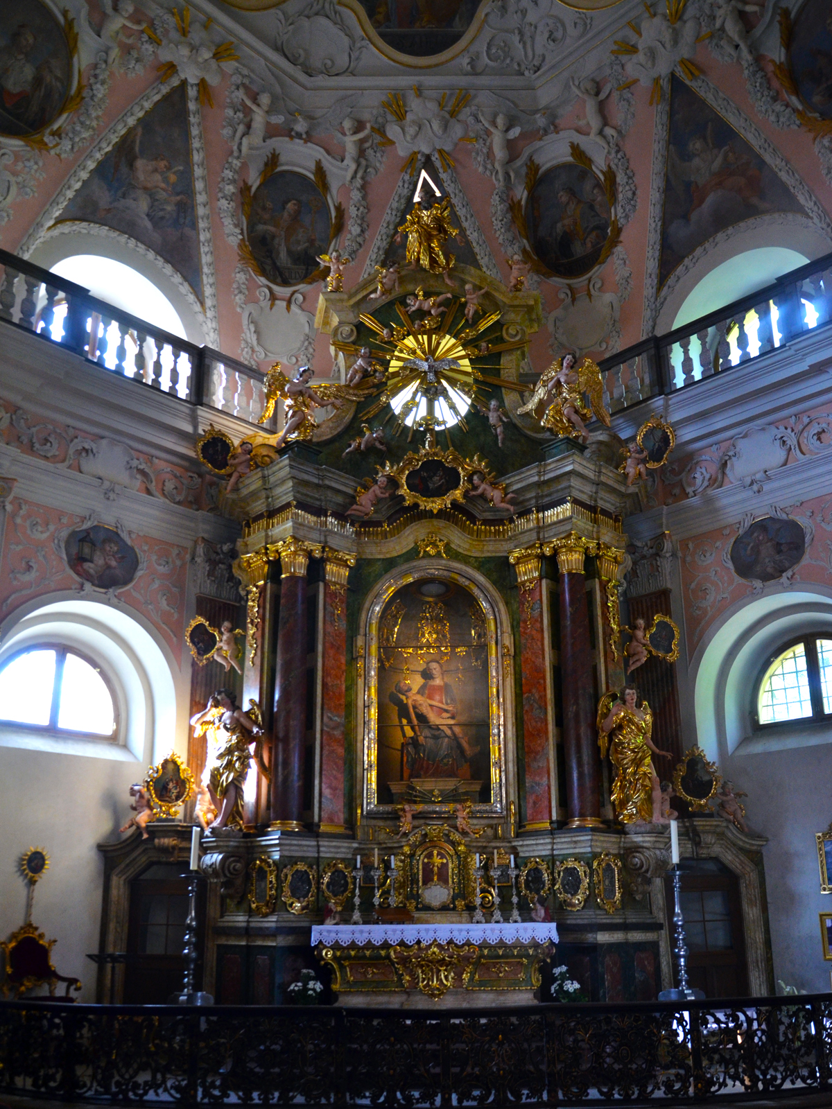 Oltář v Kapli Sedmibolestné Panny marie, Kostel svatého Jakuba Staršího, Jihlava